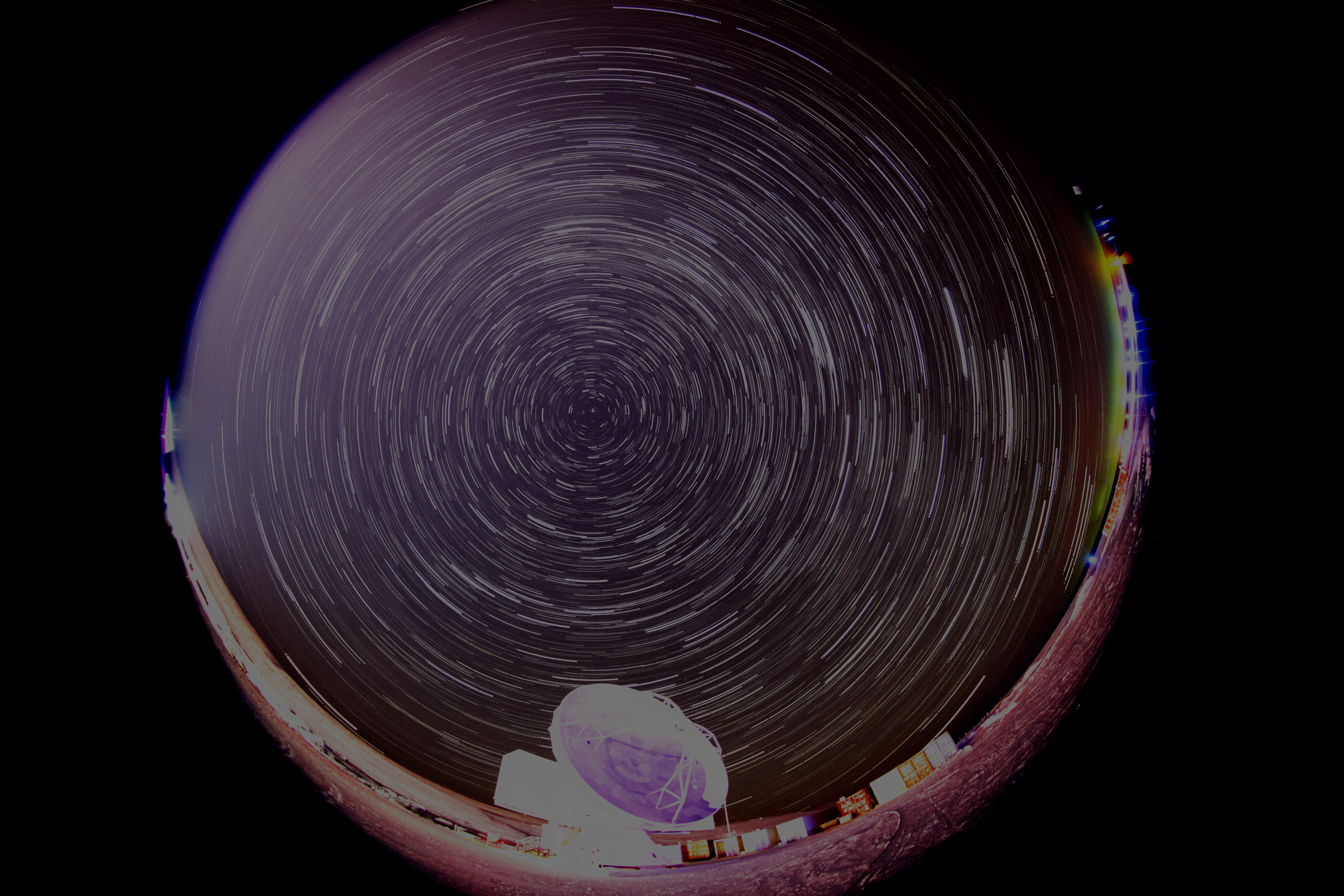 2017年永夜期間 於格陵蘭望遠鏡當時所在位置拍攝的星軌照片